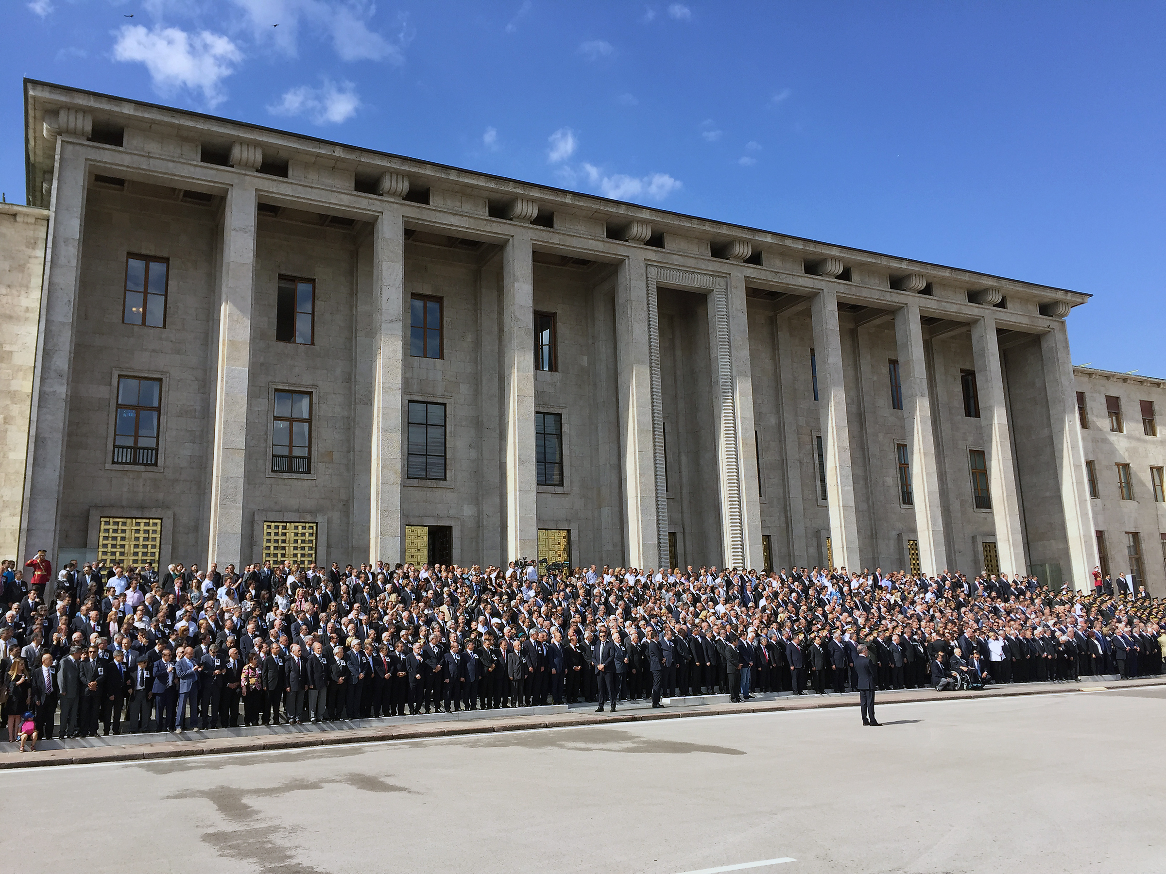 Süleyman Demirel Funeral